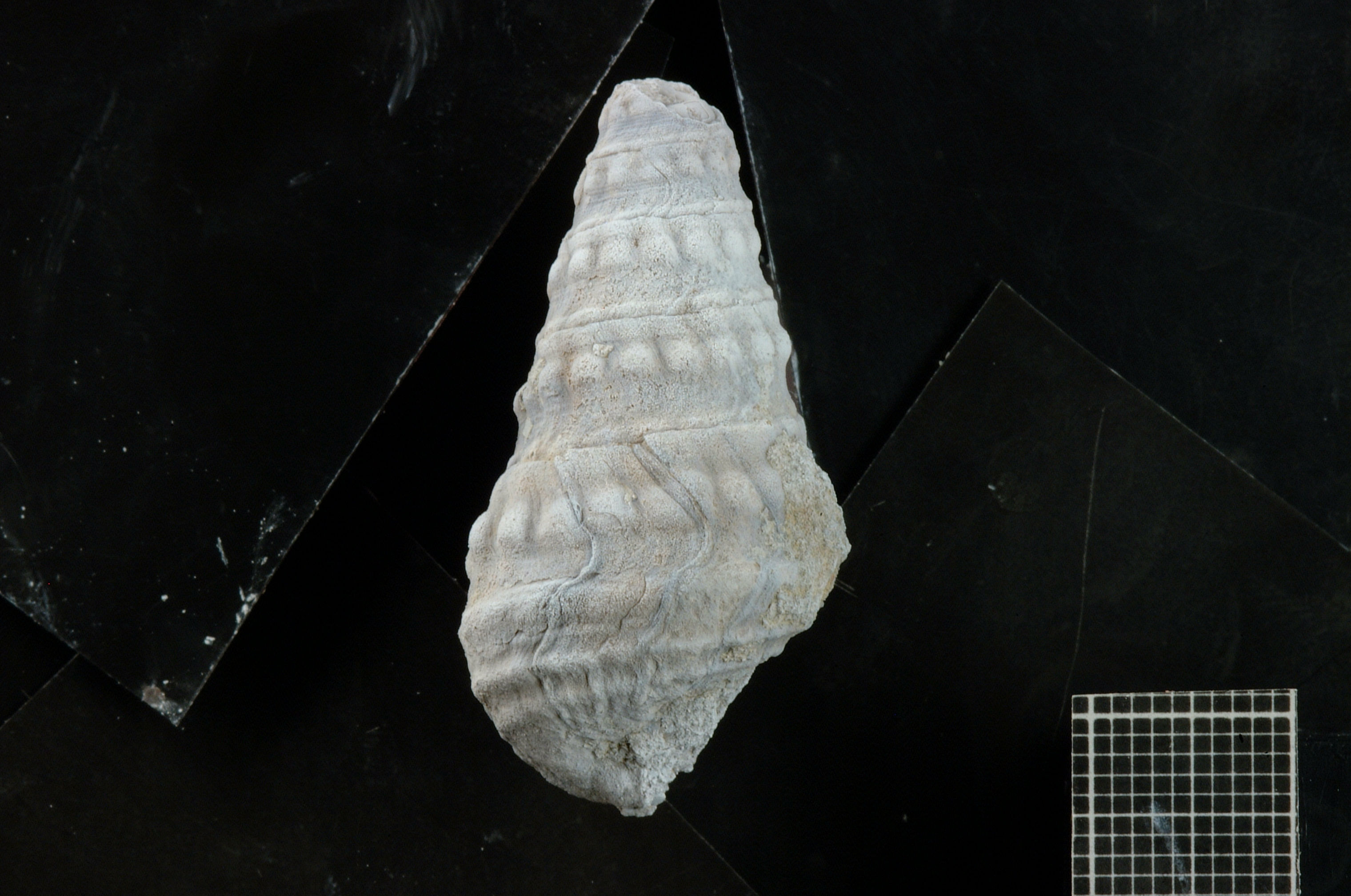 Imagen del gastrópodo marino fósil de la Formación Agrio Cerithium sp.